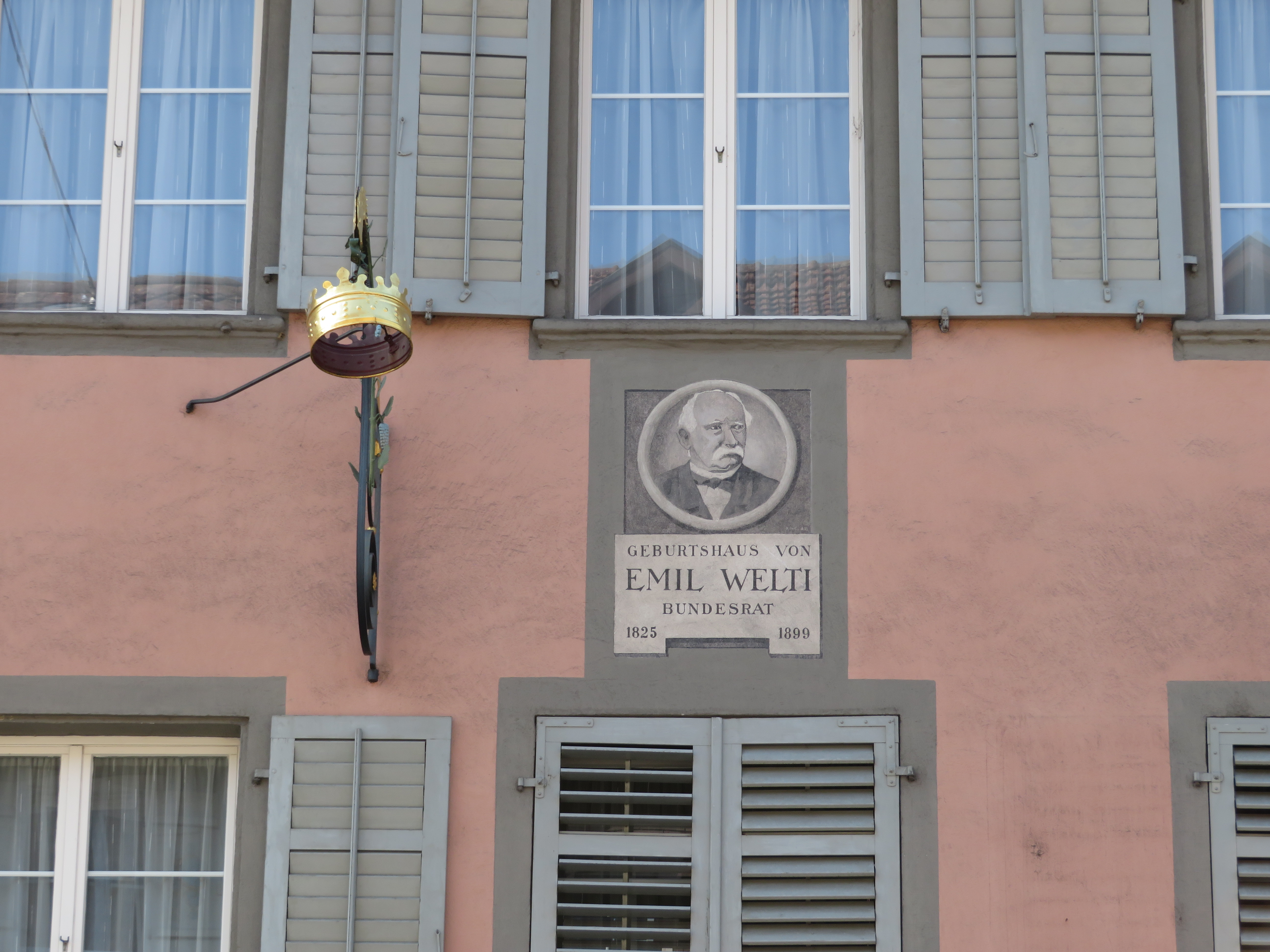 Ausleger und Erinnerungstafel am Geburtshaus Emil Weltis in Bad Zurzach, Hauptstrasse 65